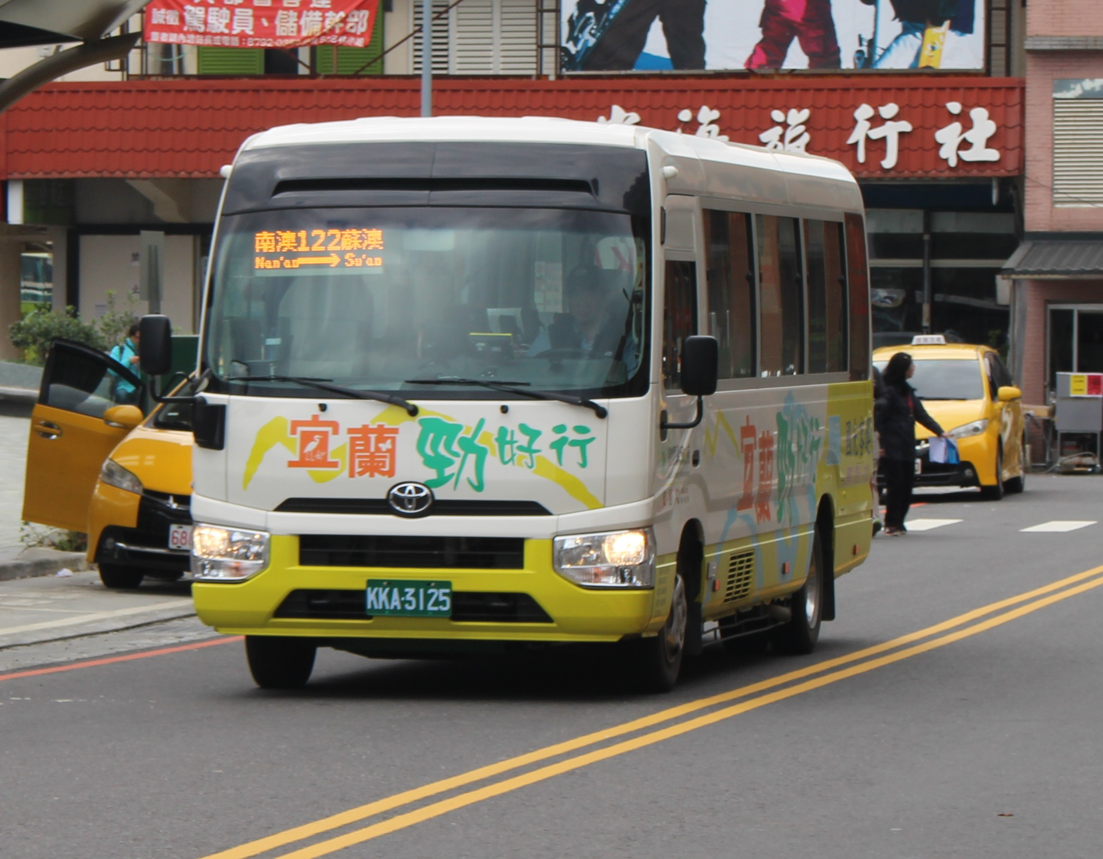 中文（台灣）: 國光客運豐田Coaster中型巴士KKA-3125，行駛宜蘭勁好行122線。